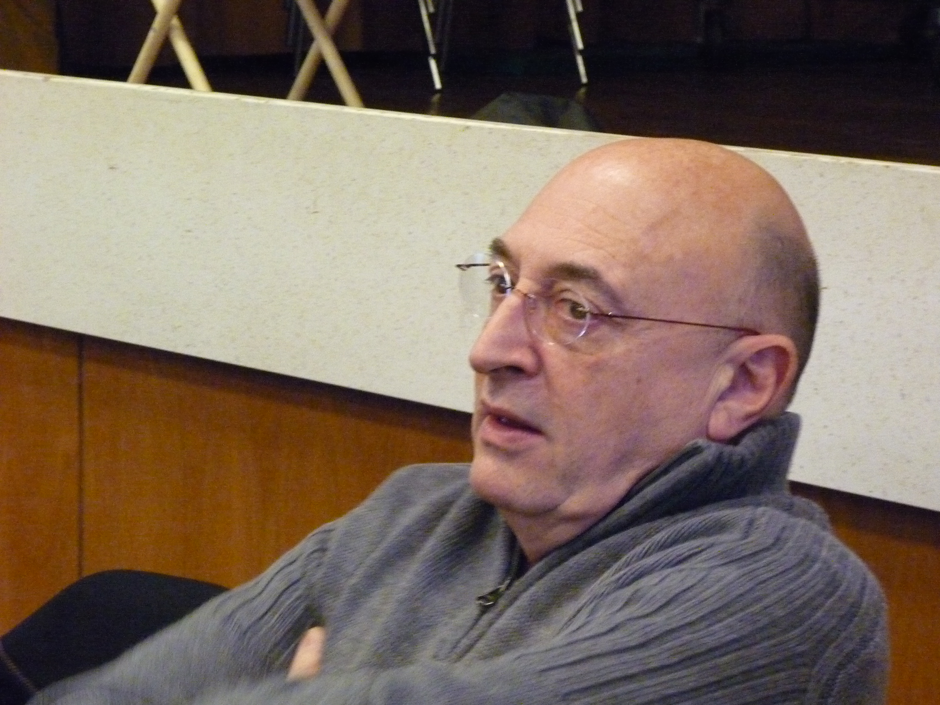 Guy Montagné à Luigny en Décembre 2008